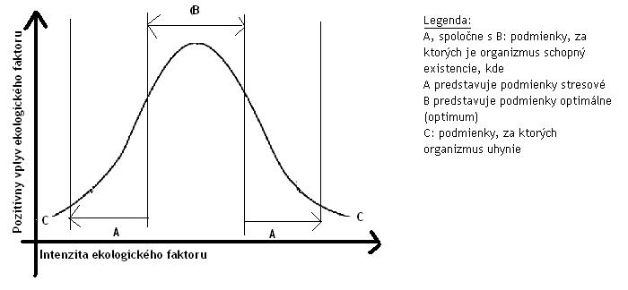 Krivka ekologickej valencie